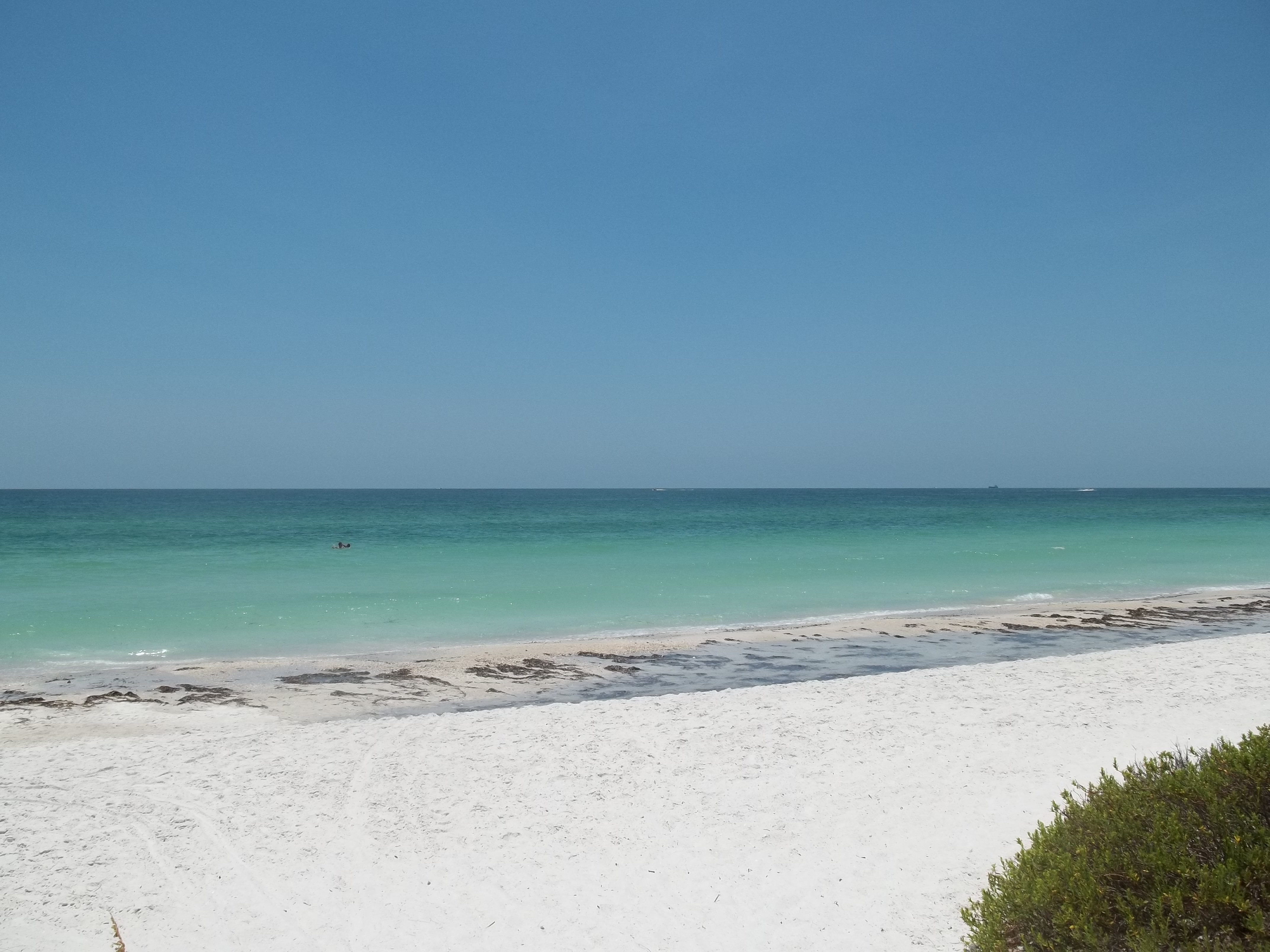 Bradenton Beach, Florida: SS Regina (1904)